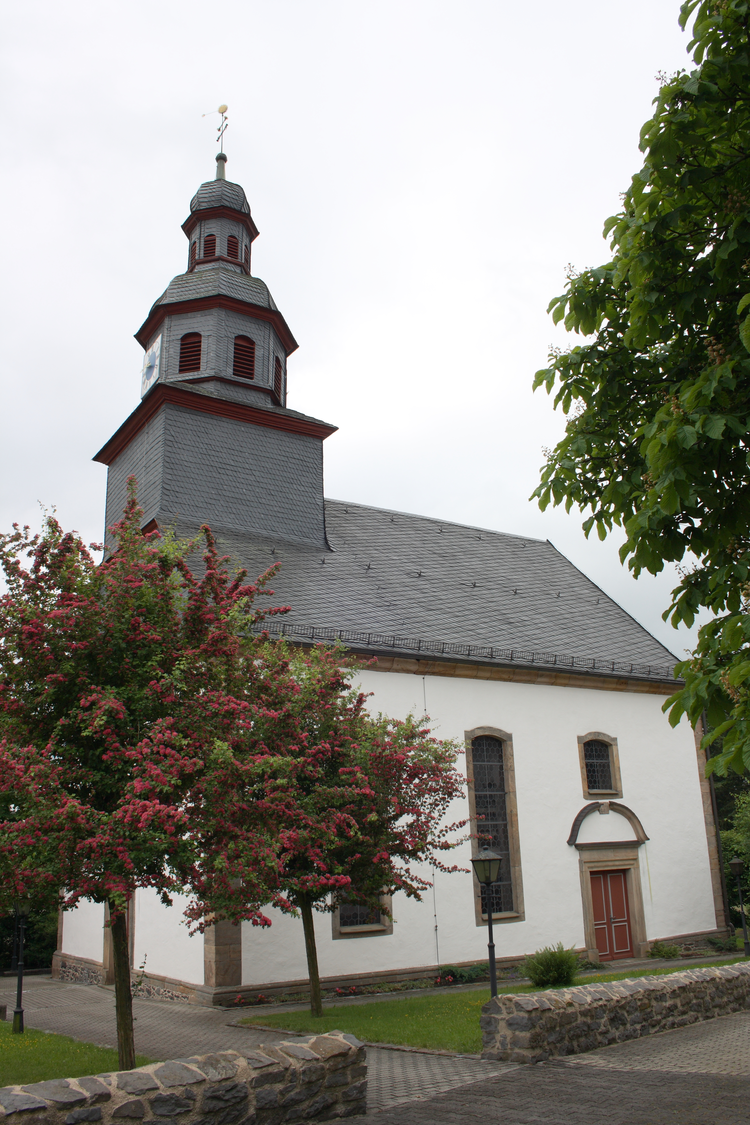 Evangelische Kirche in Storndorf, einem Ortsteil von Schwalmtal im Vogelsbergkreis (Hessen)